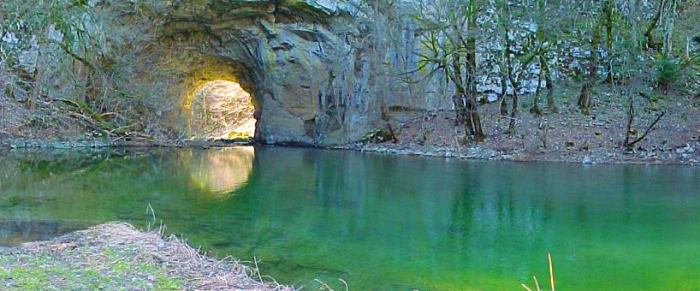 Veliki most v Rakovem Škocjanu